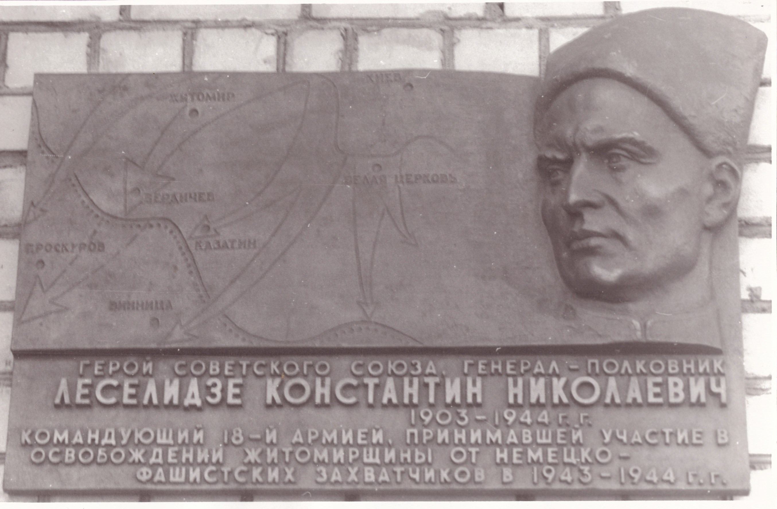 Герой Радянського Союзу генерал-полковник Леселідзе К.М. М. Житомир Житомирська область. 1987. Скульптор Таранченко В.О. Меморіальна дошка. Рельєф. Бронза. 68 х 100 х 14.